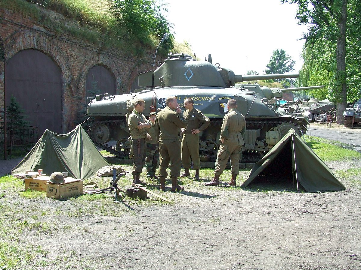 Fort IX Twierdzy Warszawa, Warsaw